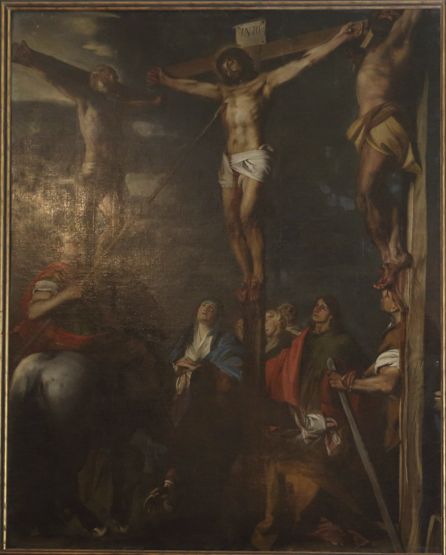 La lanzada de Longinos, óleo sobre lienzo, Madrid, Capilla del Cristo de los Dolores de la VOT